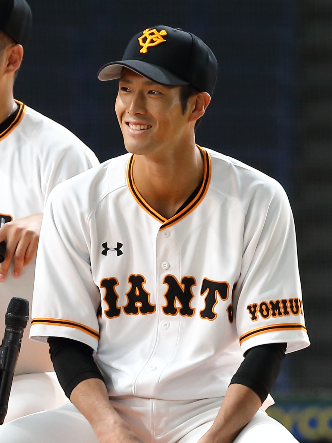 読売ジャイアンツの若林晃弘選手。2019年11月23日に東京ドームで撮影。